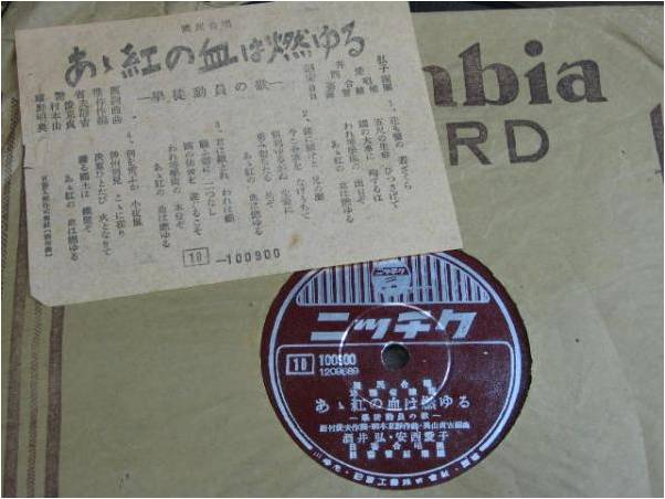 ニッチクレコード「ああ紅の血は燃ゆる」